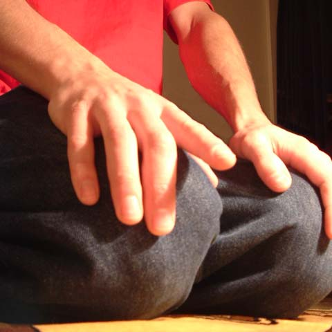 (c) Looi